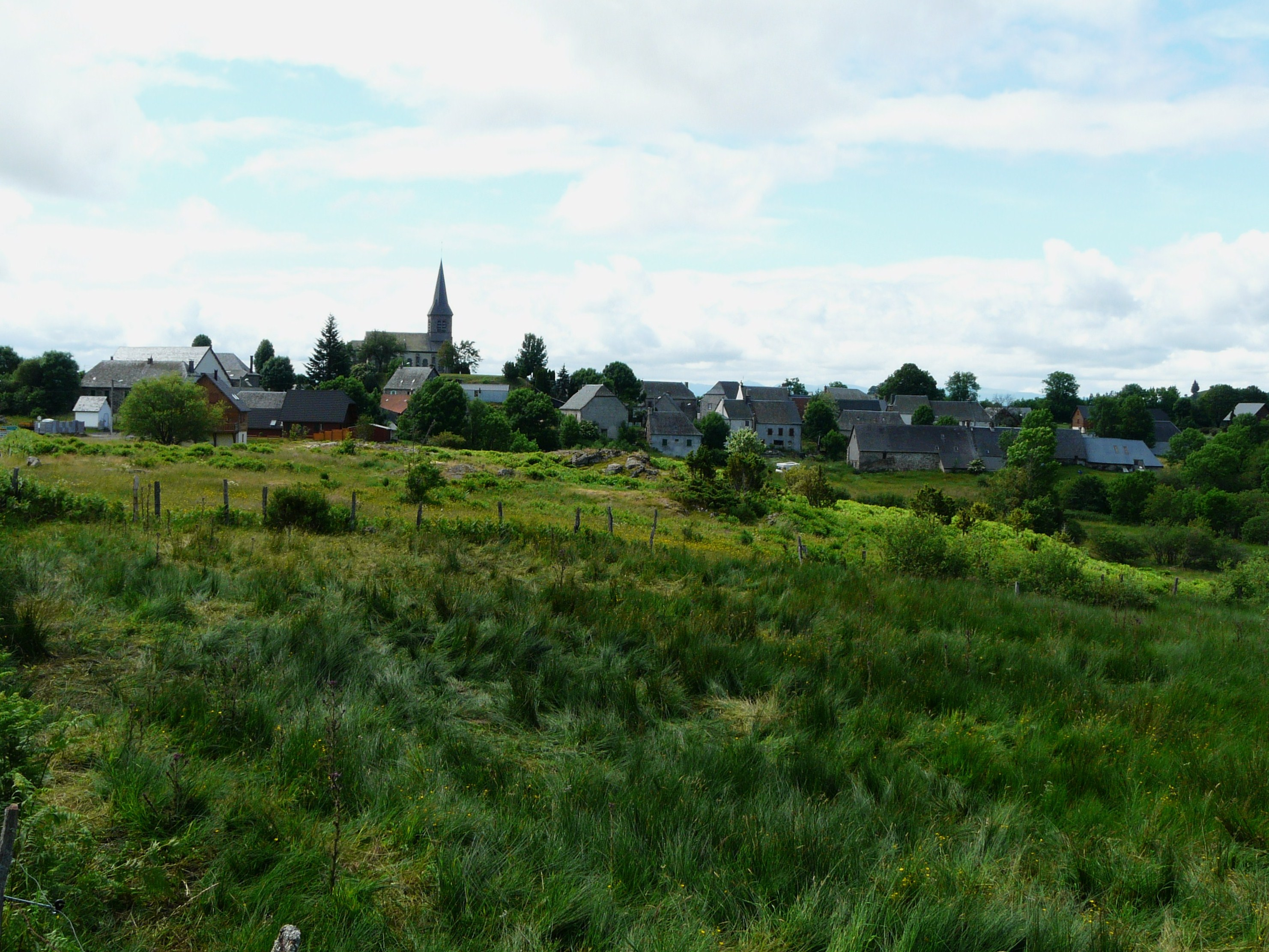 Le village de Saint-Genès-Champespe, Puy-de-Dôme, France.